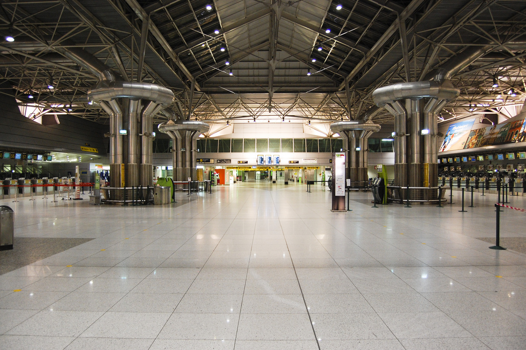 Portugal, Lisbon, airport